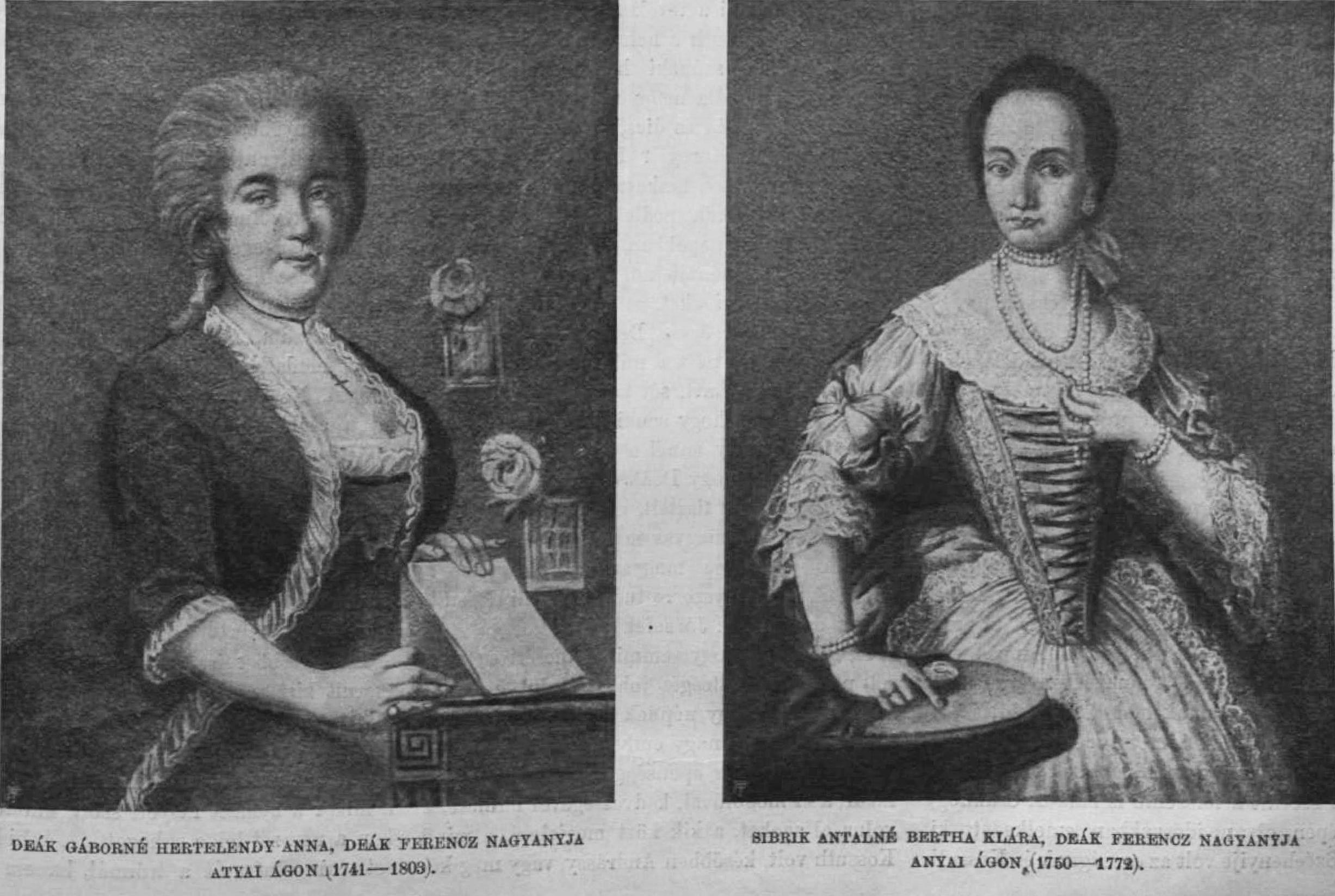 Deák Gáborné Hertelendy Anna, Sibrik Antalné Bertha Klára/Teréz